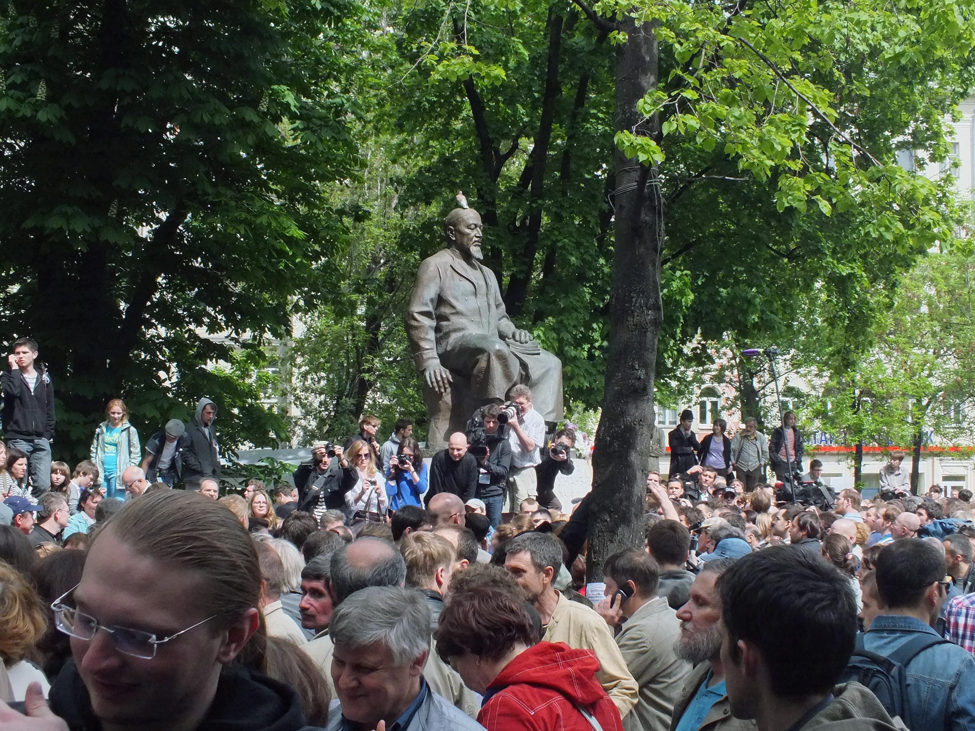 "Контрольная прогулка" с писателями. 2012.05.13